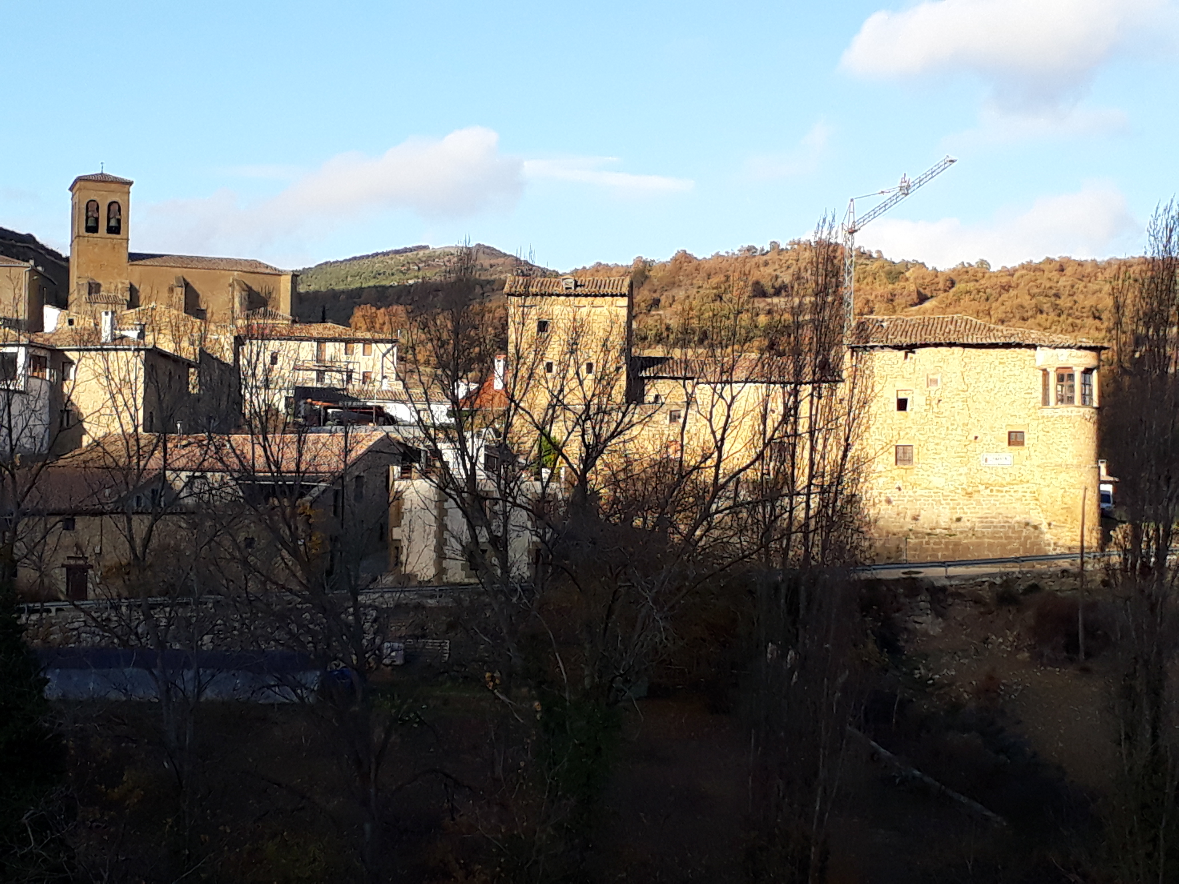 Etxarrentxulo herriaren ikuspegia. Eskuinaldean, jauregia.